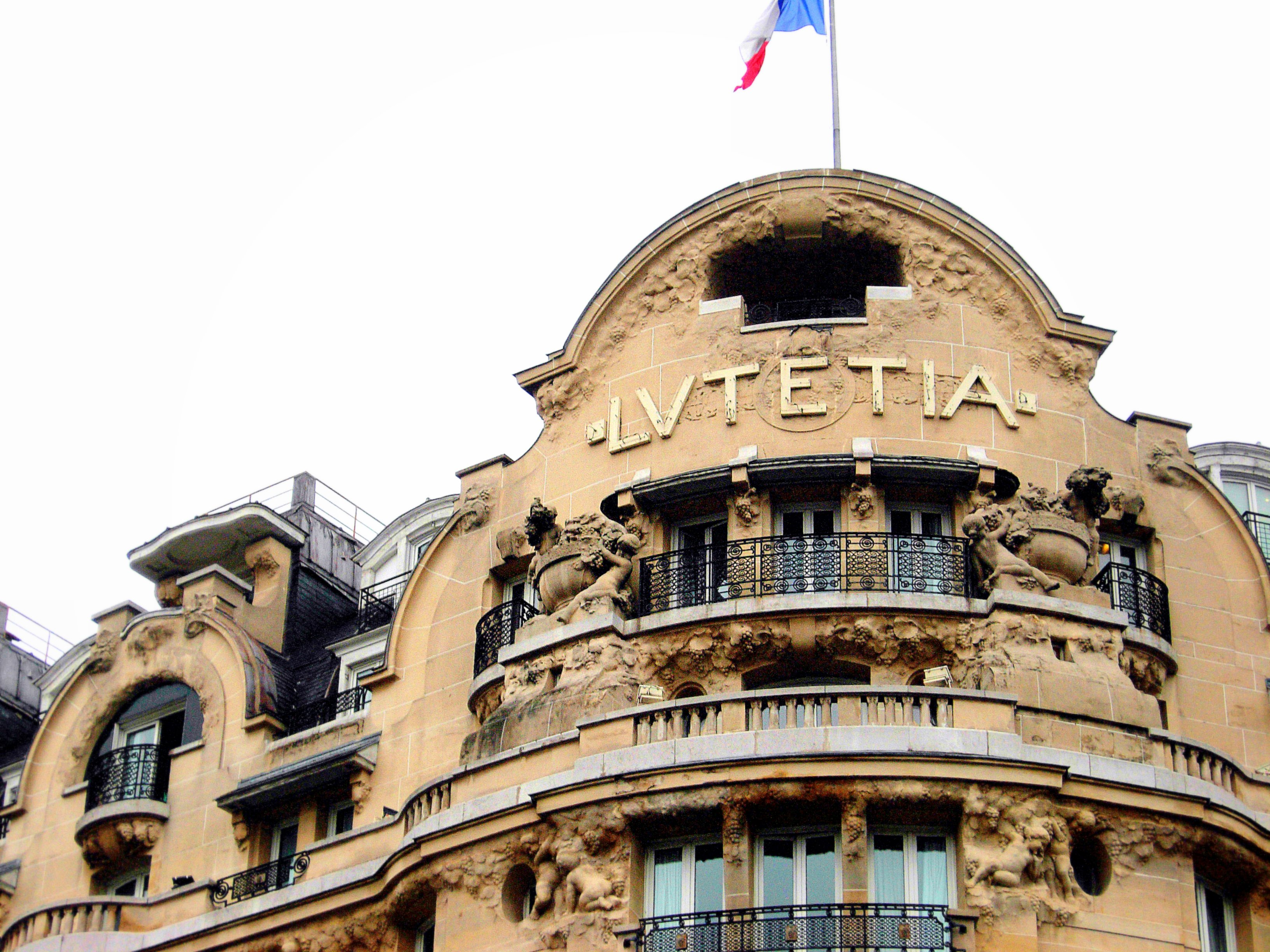 Hotel Lutetia, Paris